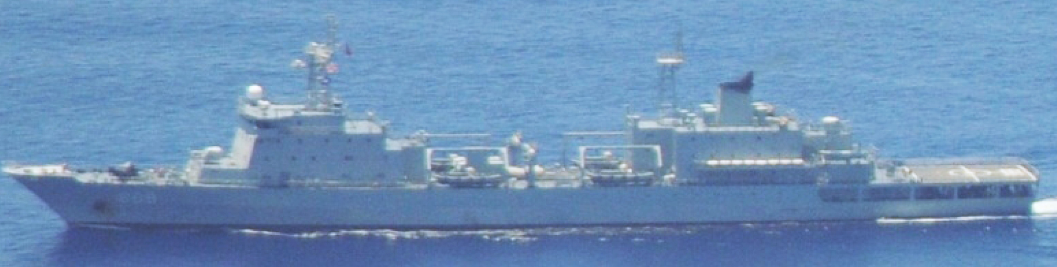 ６月１０日（水）午後０時頃、海上自衛隊第６護衛隊「おおなみ」（横須賀）が、宮古島の南約７００ｋｍの太平洋上を北西進する中国海軍ルーヤンI級ミサイル駆逐艦１隻、ユージャオ級揚陸艦１隻及びダンヤオ級補給艦１隻の合計３隻を確認した。なお、当該艦艇が、西太平洋において、各種訓練を実施しているのを確認した。